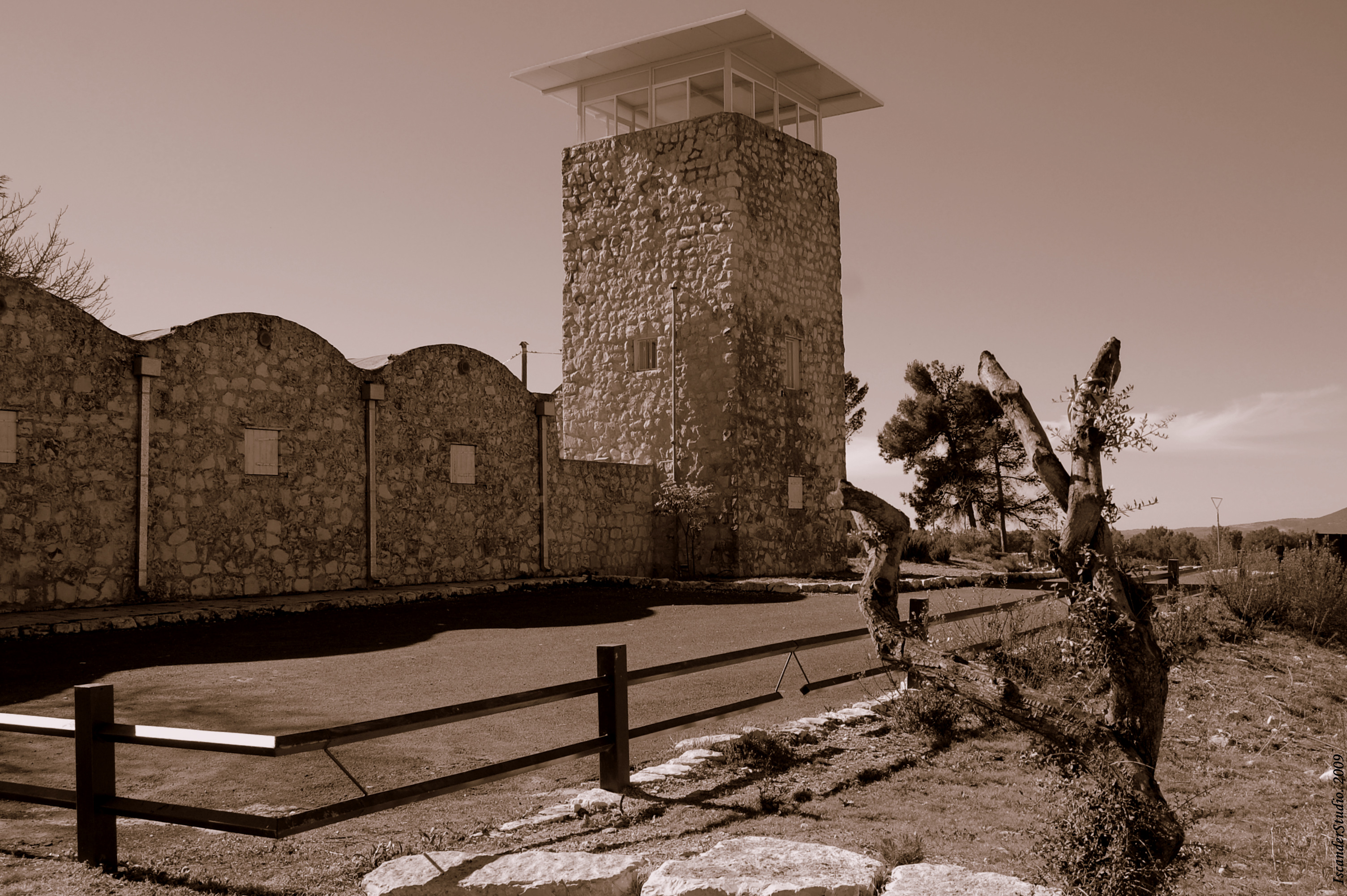 מצודת ביריה היא מצודה שנבנתה בשנות המנדט הבריטי בסמוך למקום בו מצוי כיום מושב ביריה, שהייתה זירת האירוע המכונה "העלייה לביריה" בשנת 1946, ומשמשת כיום כמוזיאון.